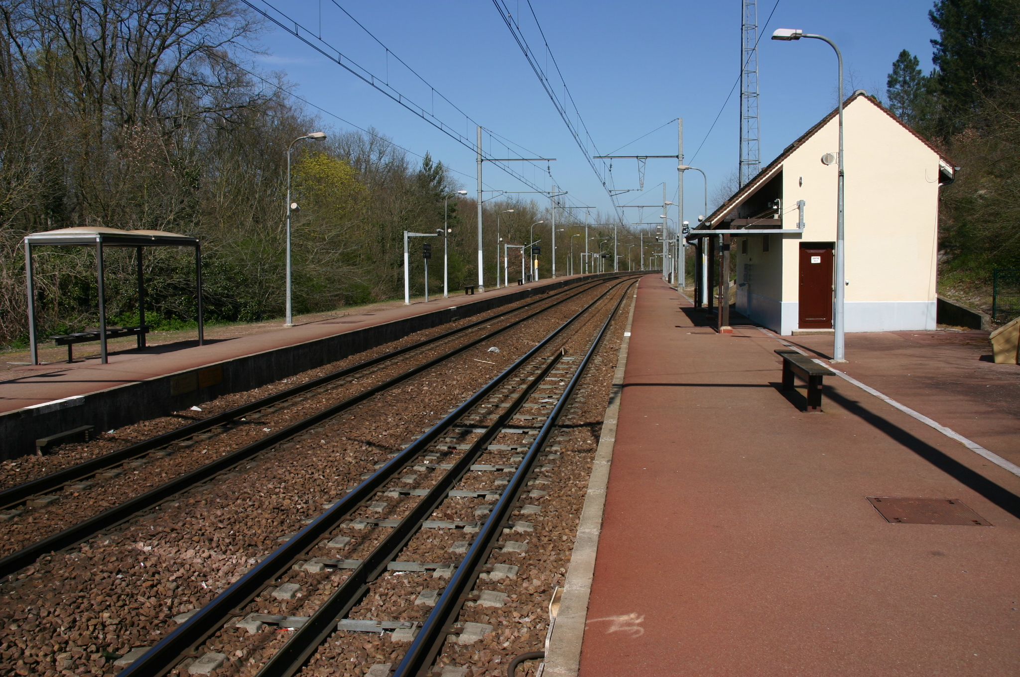 Gare de Buno - Gironville, Essonne (France)